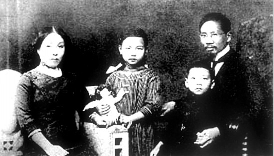 蔡元培与夫人及蔡威廉（左二）姐弟，1912年9月摄于德国。